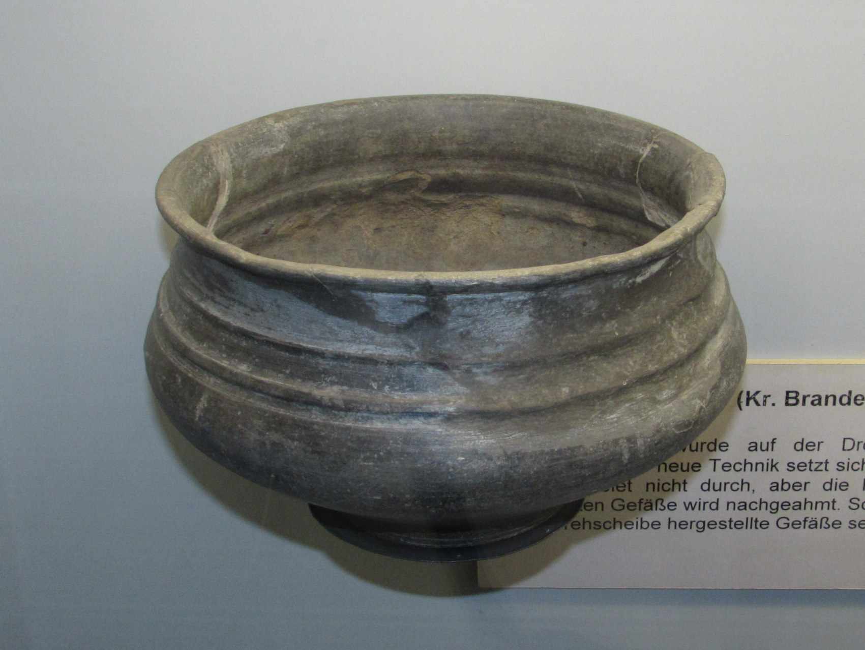 urne bzw. tongefäß, fundplatz butzow, kreismuseum jerichower land in genthin